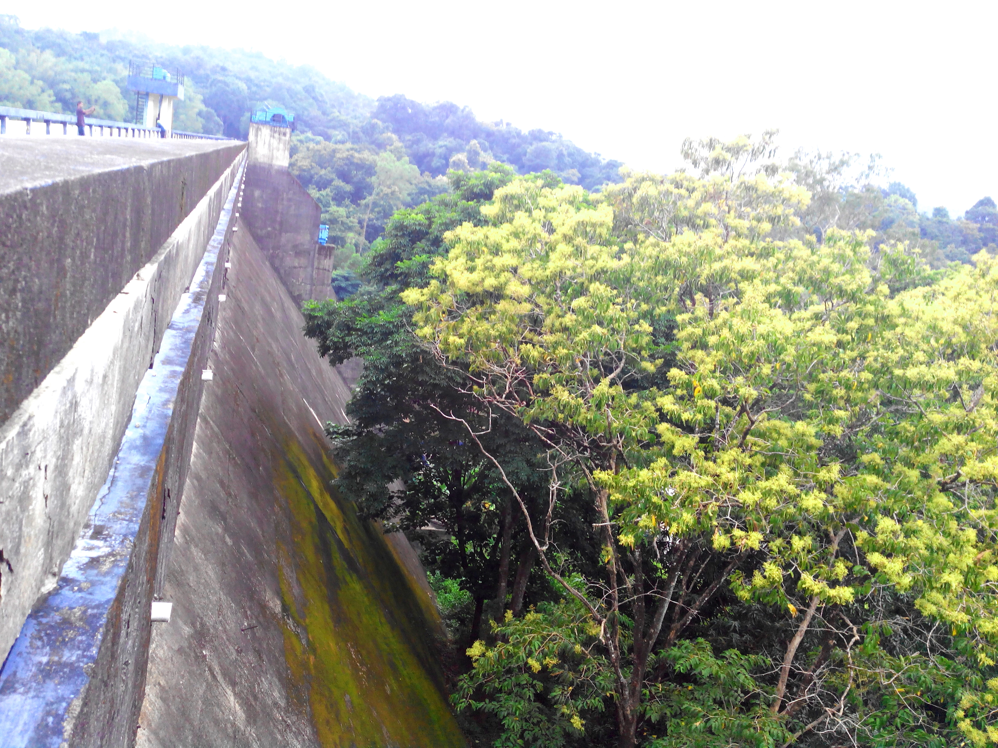 Peppara Dam Reservoir - Dam side View